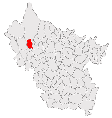 Categorie:Hărţi ale judeţului Buzău